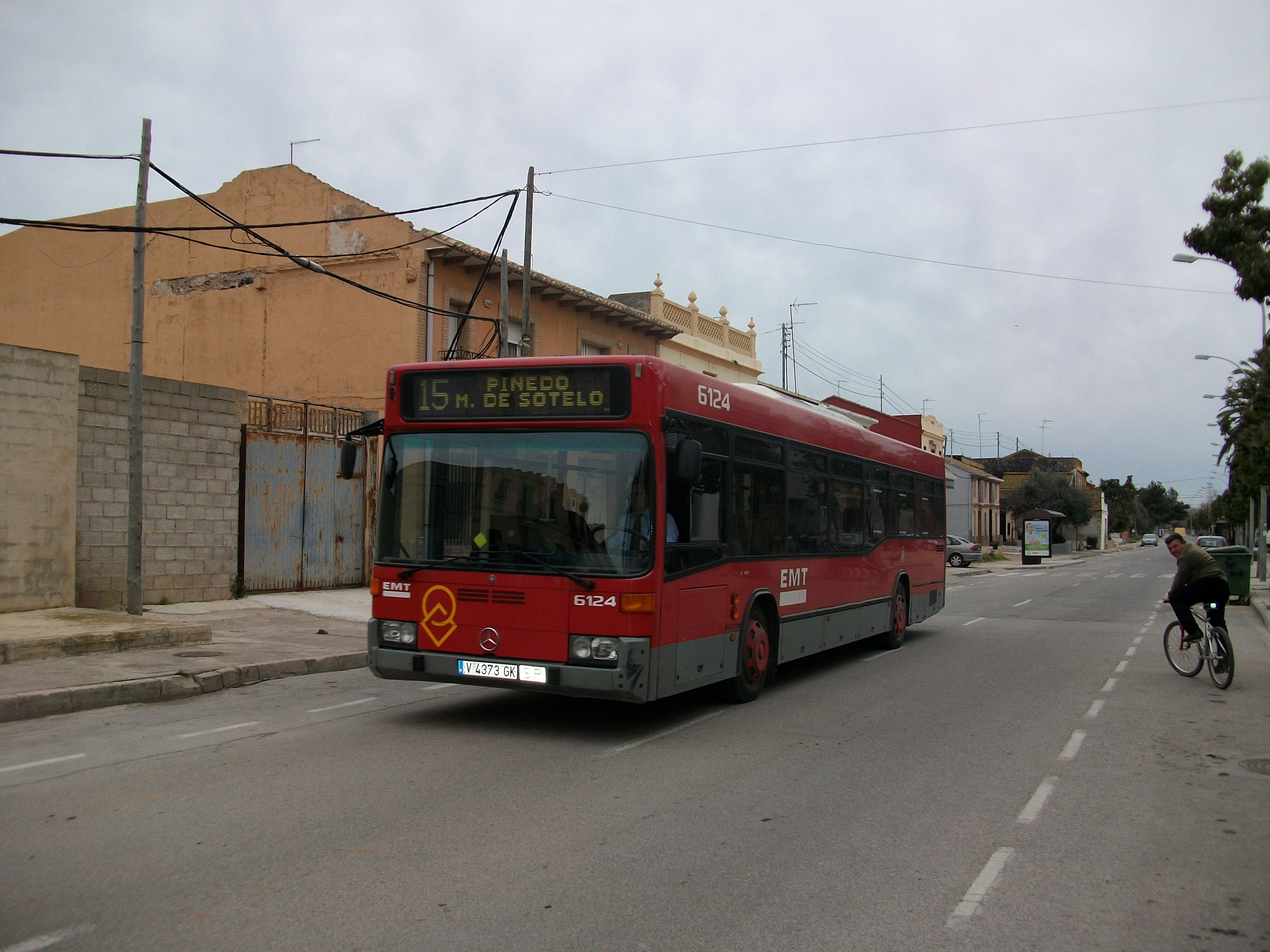 Autobus Mercedes Benz O405 de la EMT Valencia, en la línea 15